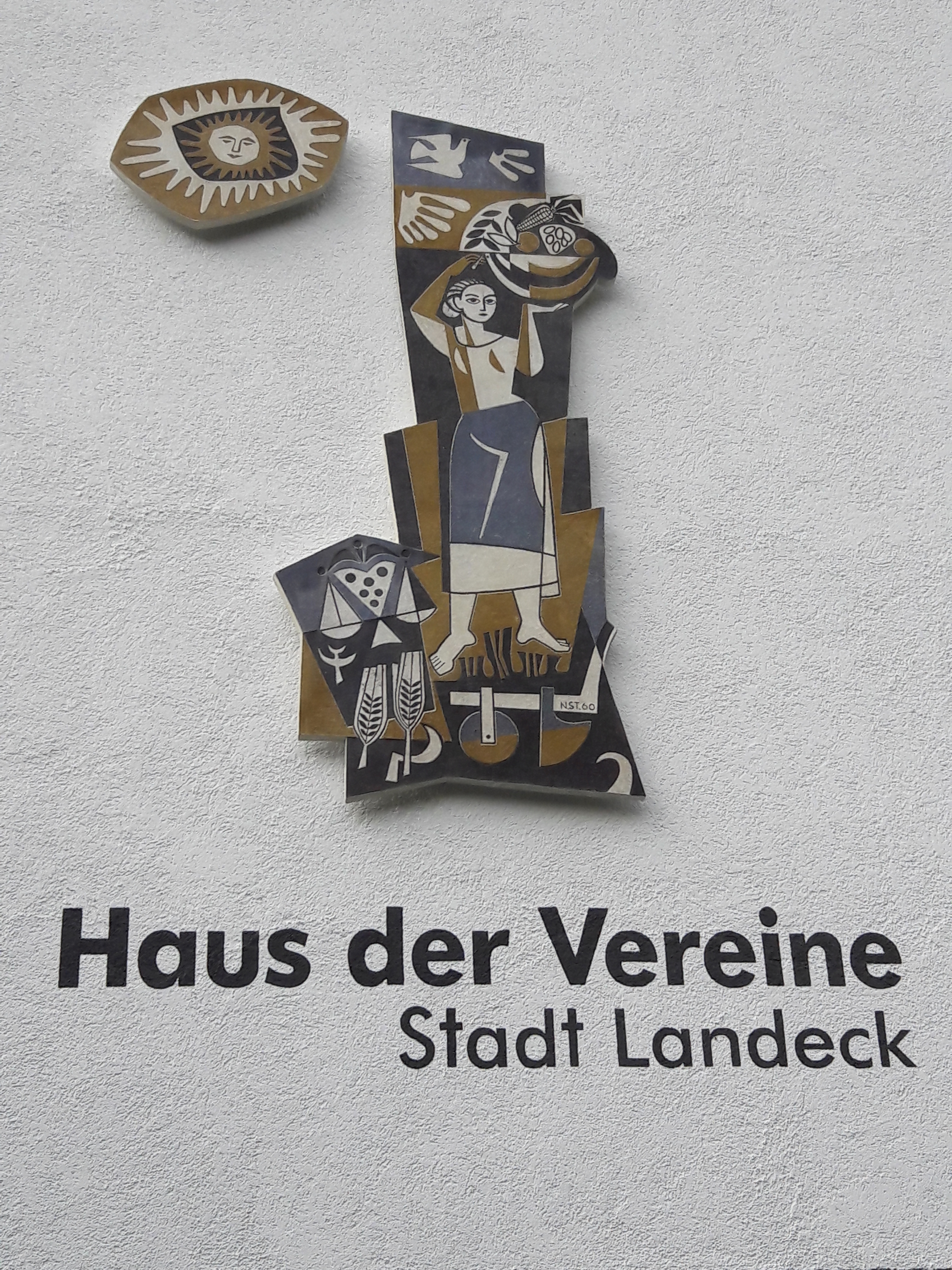 Das Sgraffito von Prof. Norbert Strolz stammt aus dem Jahr 1960 und war an der Fassade der Landw. Genossenschaft Zams angebracht, die abgerissen wurde. Kurz vor dem Abriss konnte das Kunstwerk durch eine Privatinitative gerettet werden. Es wurde restauriert und in Landeck am Haus der Vereine (Perjen, Riefengasse) wieder angebracht